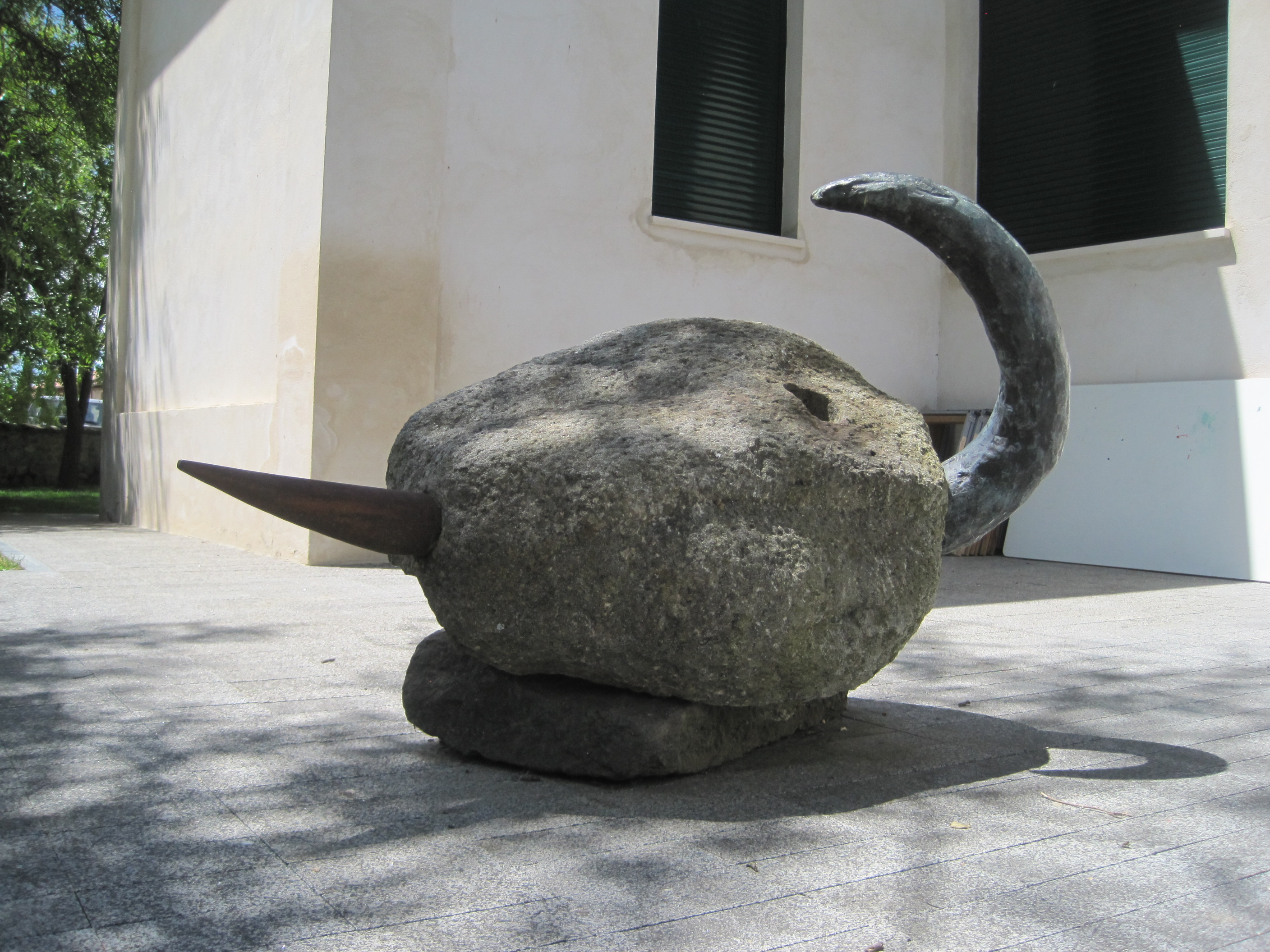 Escultura Gran Chivo (1999), de Eduardo Arroyo, en la sede de la Fundación Cerezales Antonino y Cinia (Cerezales del Condado, León, España).